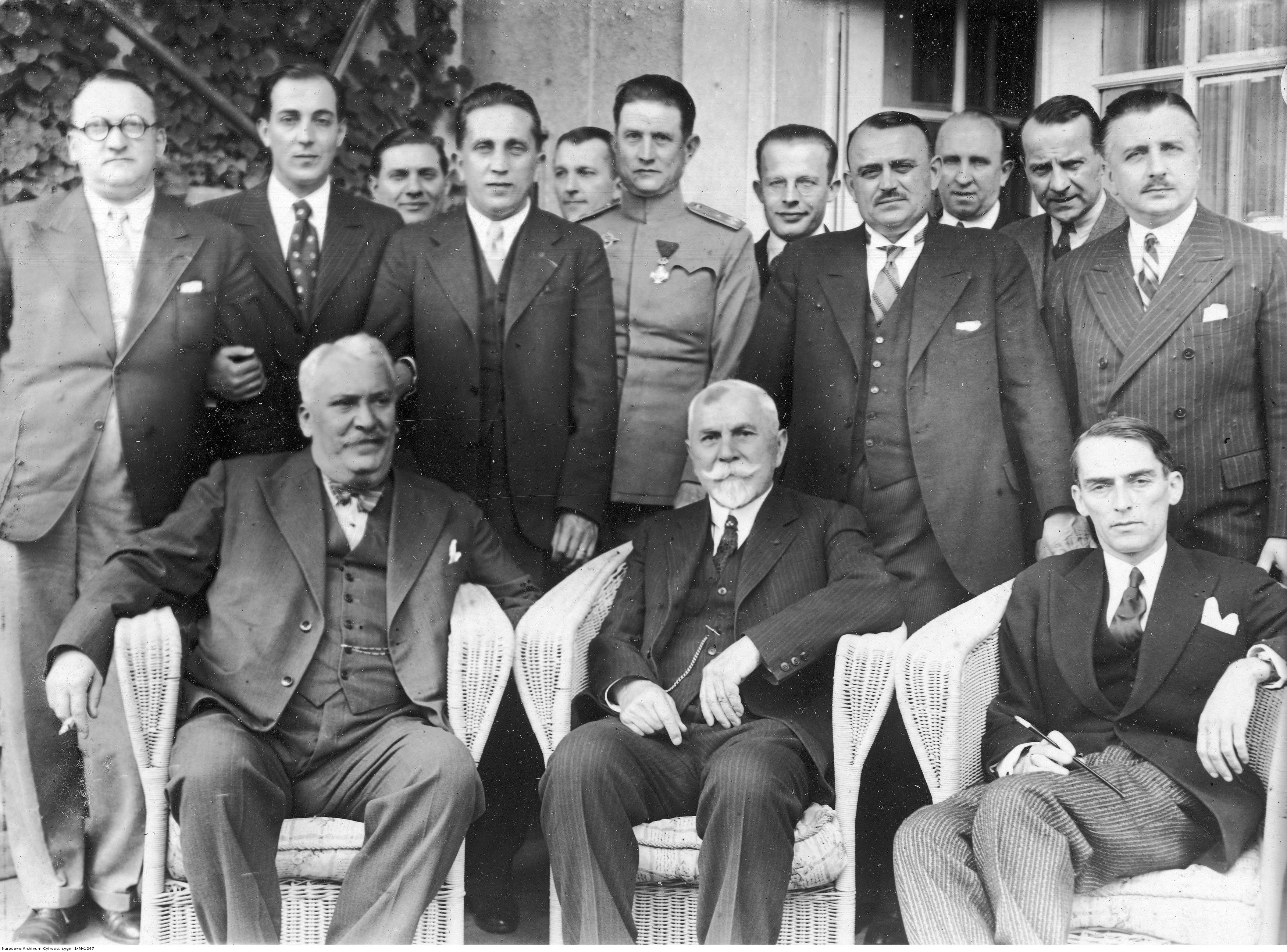 Podpułkownik Bogdan Kwieciński i pilot major Wacław Makowski, którzy oblatywali trasę Międzynarodowych Zawodów Samolotów Turystycznych (Challenge 1934) podczas spotkania w Poselstwie RP w Belgradzie. Fotografia grupowa uczestników spotkania. Siedzą od lewej: prezes Aeroputu Novaković, wiceprezes Aeroklubu Jugosłowiańskiego Vlajić, Sondenmajer. Stoją: ppłk Bogdan Kwieciński (1. z lewej), sekretarz Aeroklubu Jugosłowiańskiego Marković, pilot mjr Wacław Makowski (I rząd 3. z lewej), dowódca pułku lotniczego Tomić, attache Poselstwa RP w Belgradzie Wacław Knoll (4. z prawej), attache prasowy Poselstwa RP w Belgradzie Ksawery Glinka (3. z prawej), attache wojskowy Poselstwa RP w Belgradzie mjr Jan Grudzień (2. z prawej), poseł nadzwyczajny i minister pełnomocny Polski w Belgradzie Władysław Schwarzburg-Gunther (1. z prawej). Koncern Ilustrowany Kurier Codzienny - Archiwum Ilustracji. Sygnatura: 1-M-1247